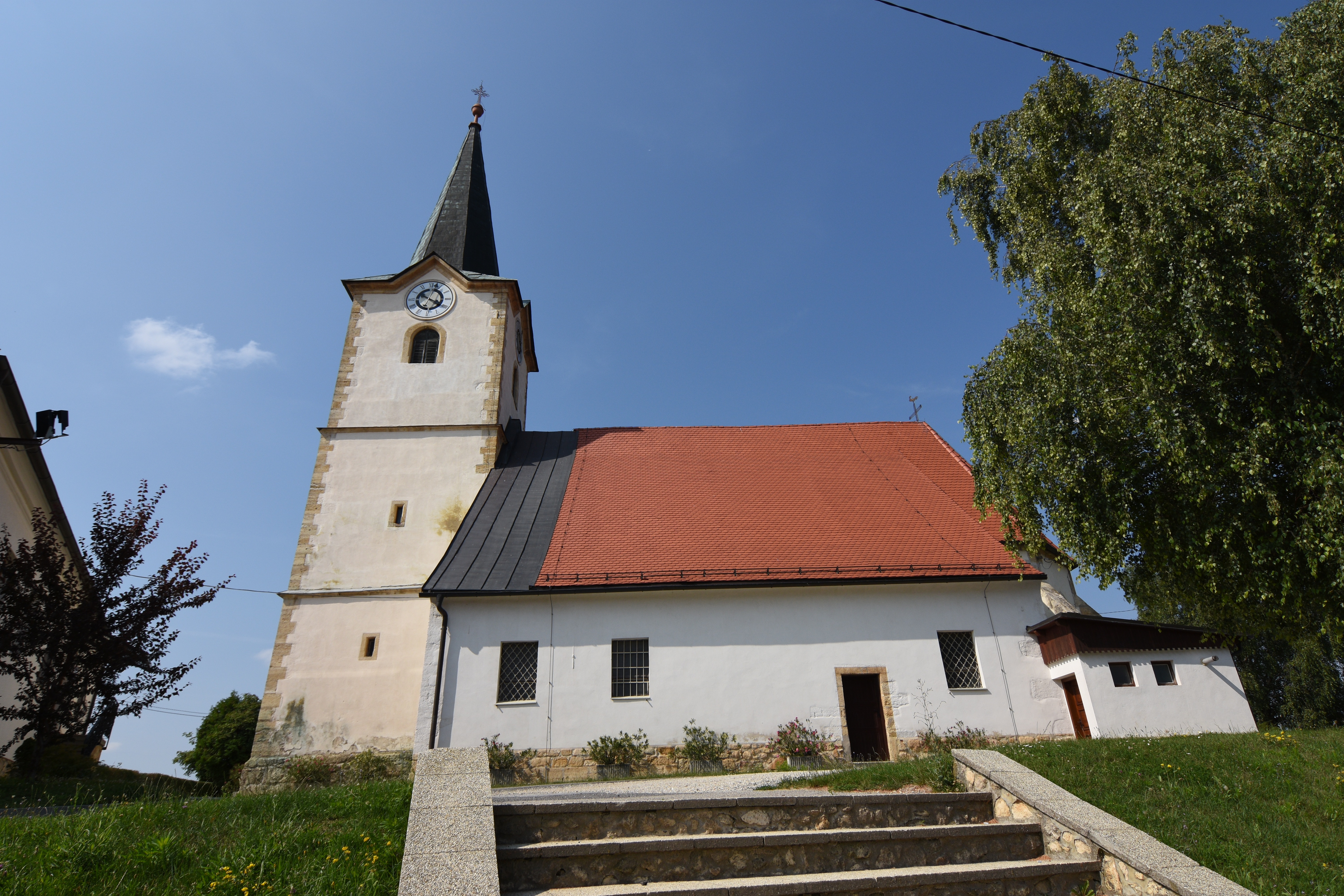 Cerkev svetega Antona Puščavnika (Cerkvenjak)